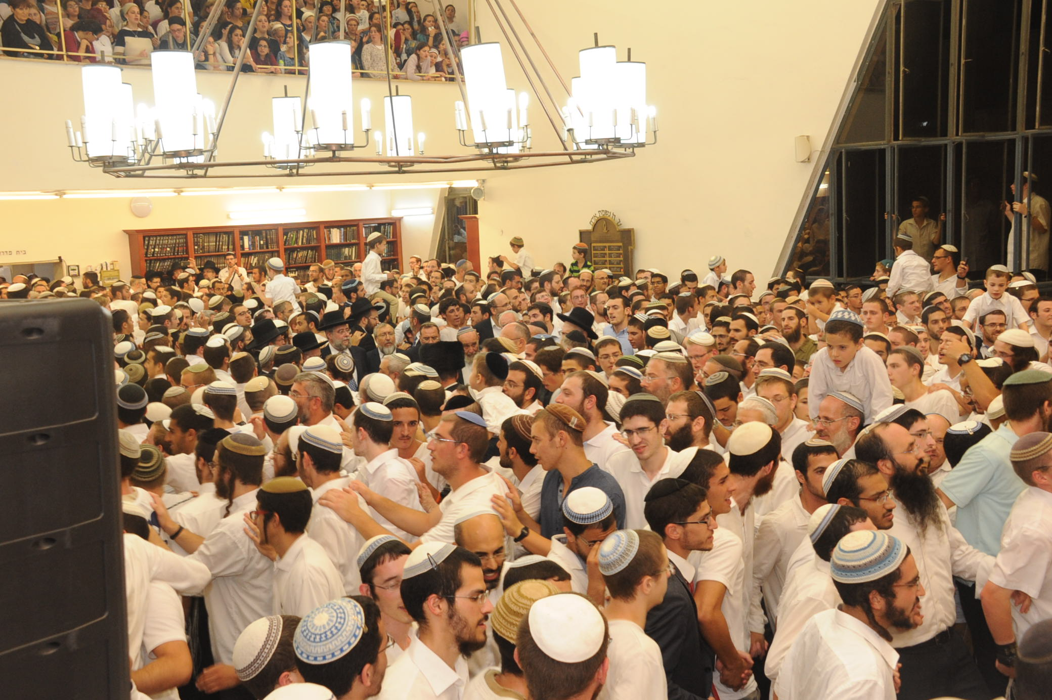 ריקודים בשמחת בית השואבה בישיבת מרכז הרב